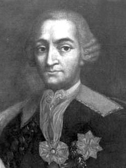 Станіслав Любомирський (воєвода київський)